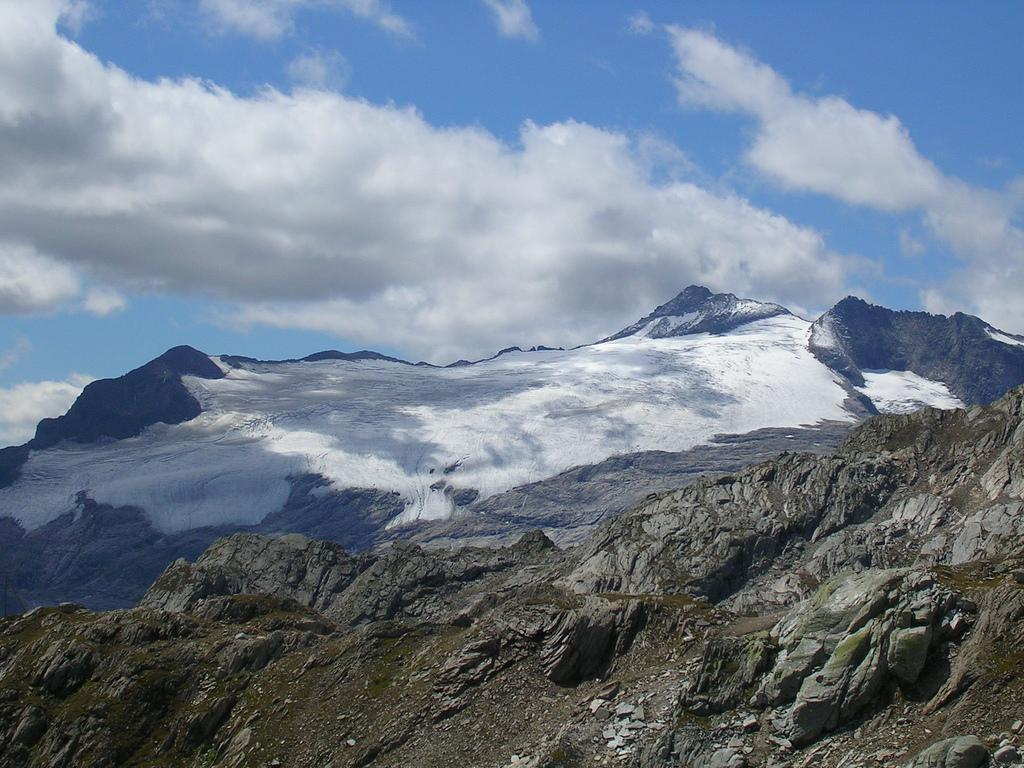 Basodino glacier, Lepontine Alps